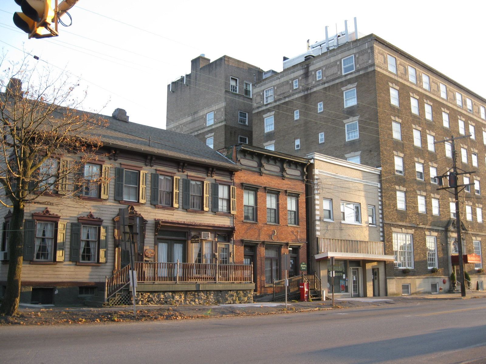 Philipsburg, Pennsylvania